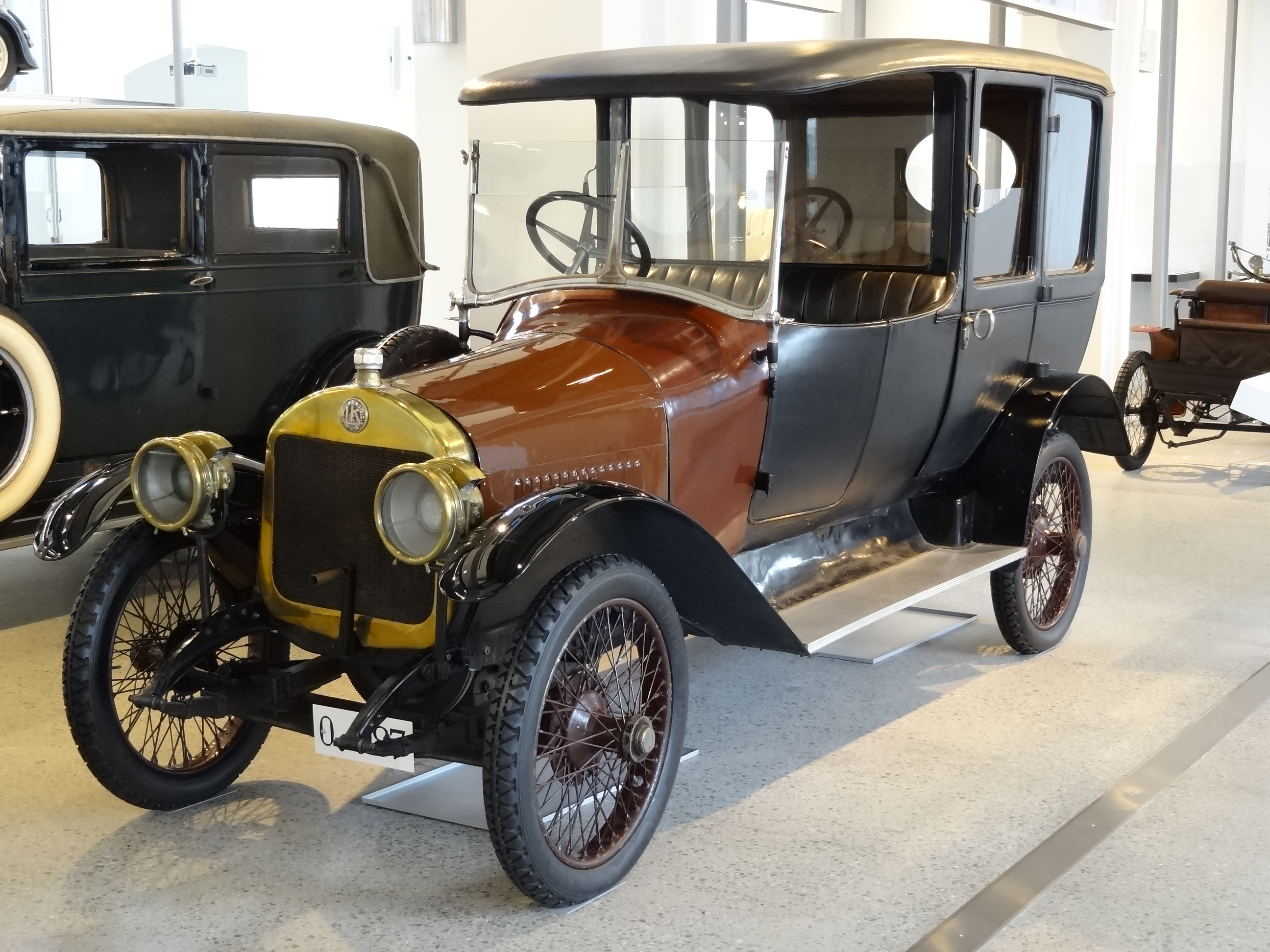 Landaulet